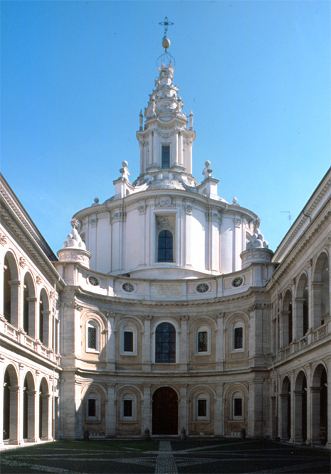 Sant'Ivo alla Sapienza - vista dal cortile di ingresso